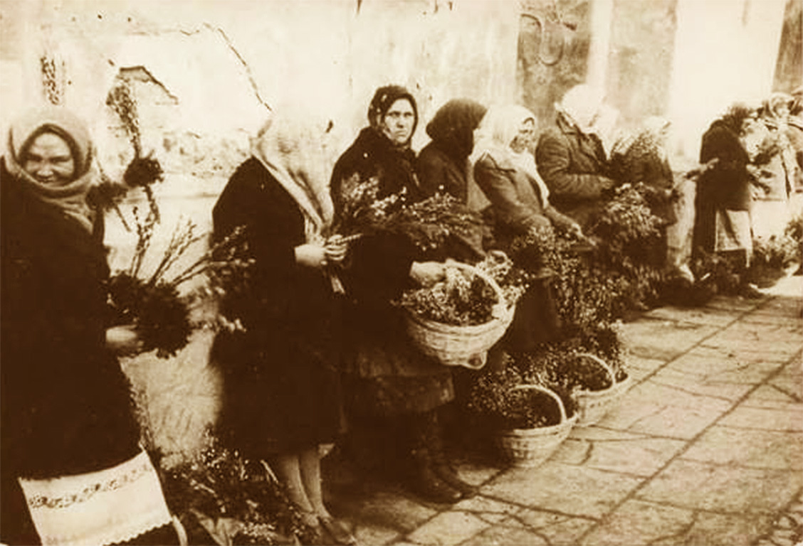 Напередодні Вербної неділі. Луцьк, перша третина ХХ ст.